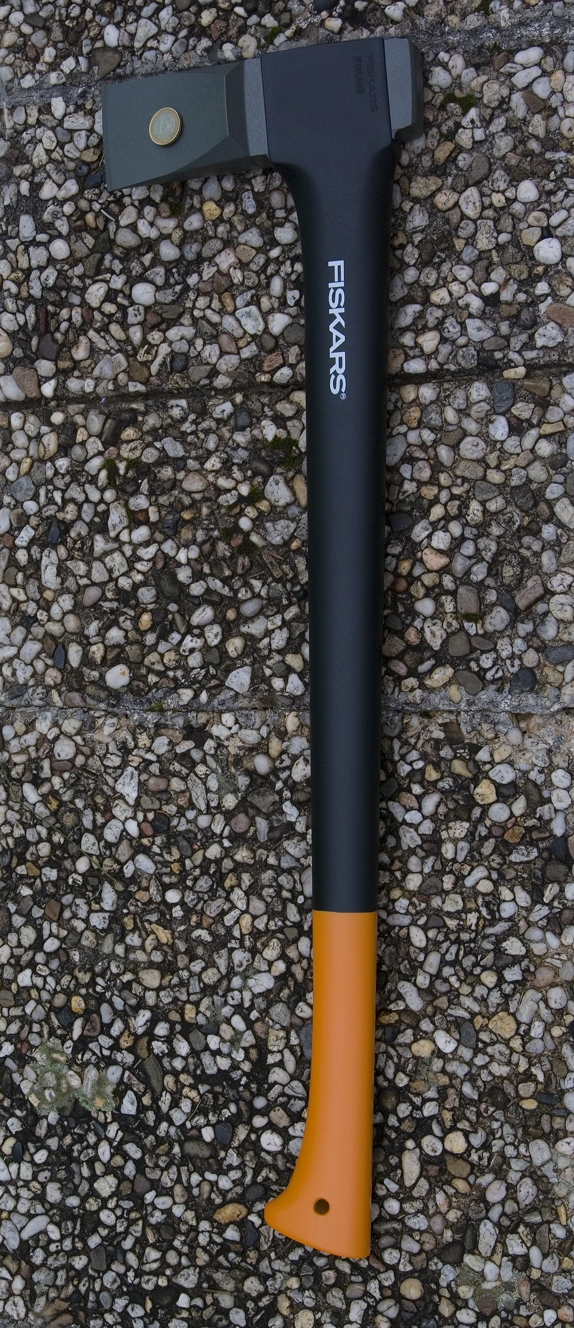 Fiskars Spaltaxt 2400 mit 1 Euro Münze zum Größenvergleich